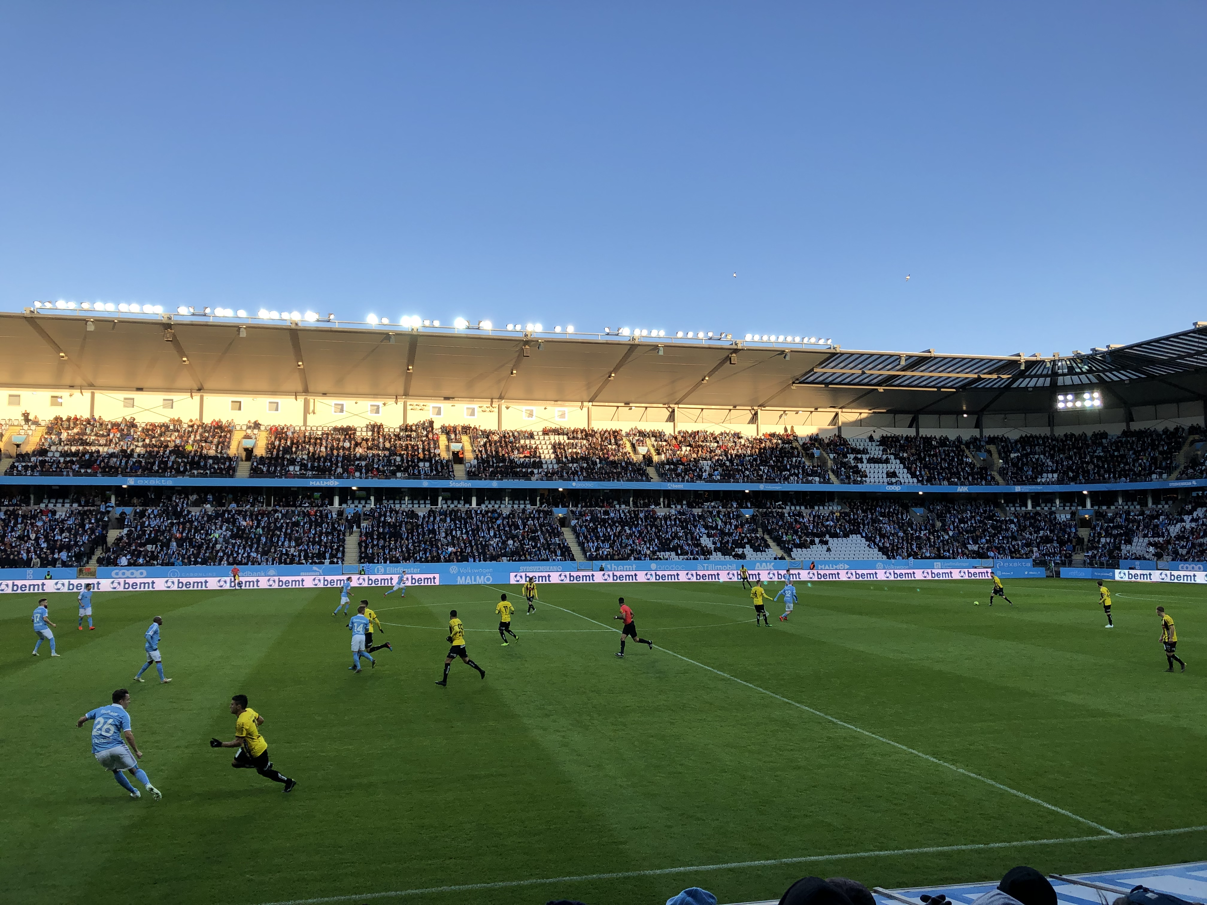 Malmö FF tar emot BK Häcken i premiäromgången av Allsvenskan 2019